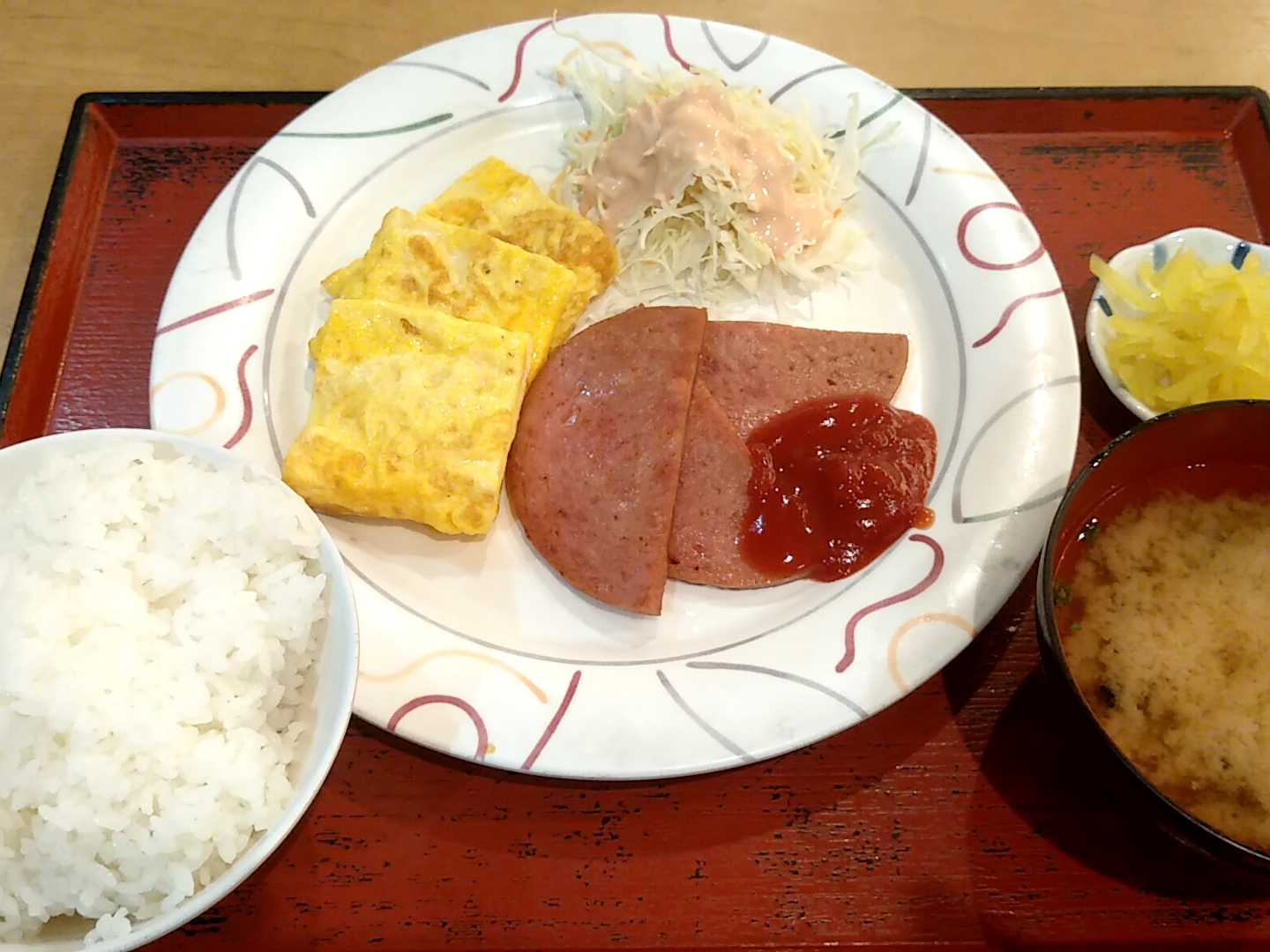 最強食堂美里店のポーク玉子定食